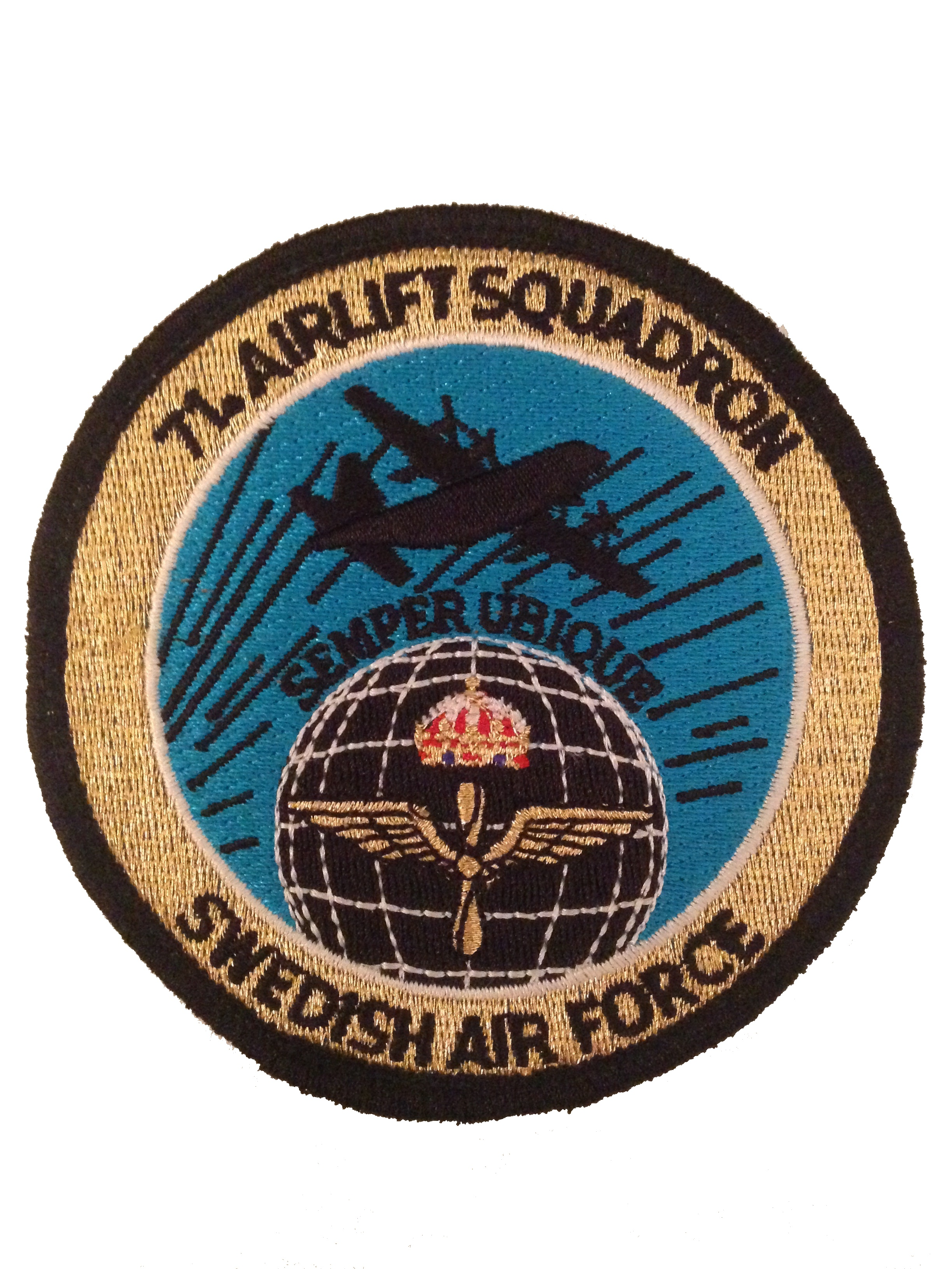 Divisionsmärke för 71. Transportflygdivisionen